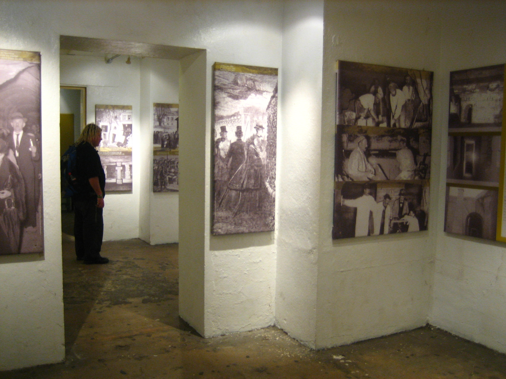 Salle consacrée à l'histoire des Catacombes de Paris.